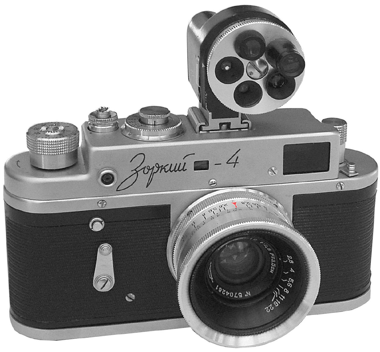 Die ursprüngliche Zorki , die noch eine ziemlich exakte Leica-Kopie war, wurde bald zu diesem recht eigenständigen Modell entwickelt. Es wies gegenüber der ersten Generation einige Verbesserungen auf und unterschied sich dann doch von der Leica. Die Zorki-4 war das erfolgreichste Zorki-Modell überhaupt: Über 1,7 Mio. wurden von 1956 bis 1973 davon hergestellt.Das abgebildete Modell ist mit dem Weitwinkel-Objektiv „Jupiter-12 2,8/35 mm“ ausgerüstet; aufgesetzt ist der Universal-Sucher, den man braucht, um mit diesem und dem 80er und 135er-Objektiv zu fotografieren.